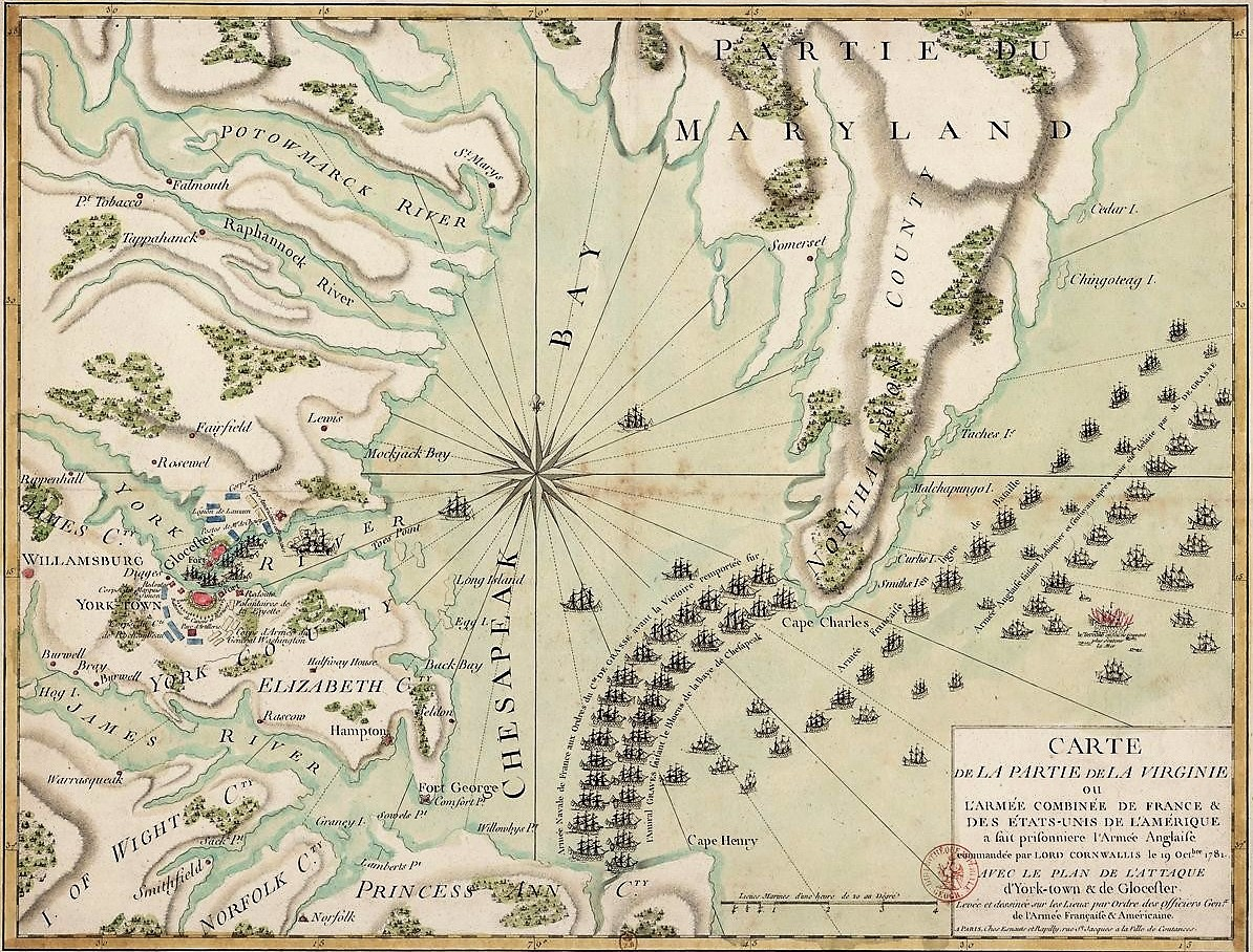 Carte de la Partie de la Virginie où l'Armée combinée de France & des Etats-Unis de l'Amérique a fait prisonnière l'Armée Anglaise commandée par Lord Cornwallis le 19 Octobre 1781. Avec le Plan de l'Attaque d'York-town & de Glocester. Levée et dessinée sur les Lieux par Ordre des Officiers Genx. de l'Armée Française et Américaine